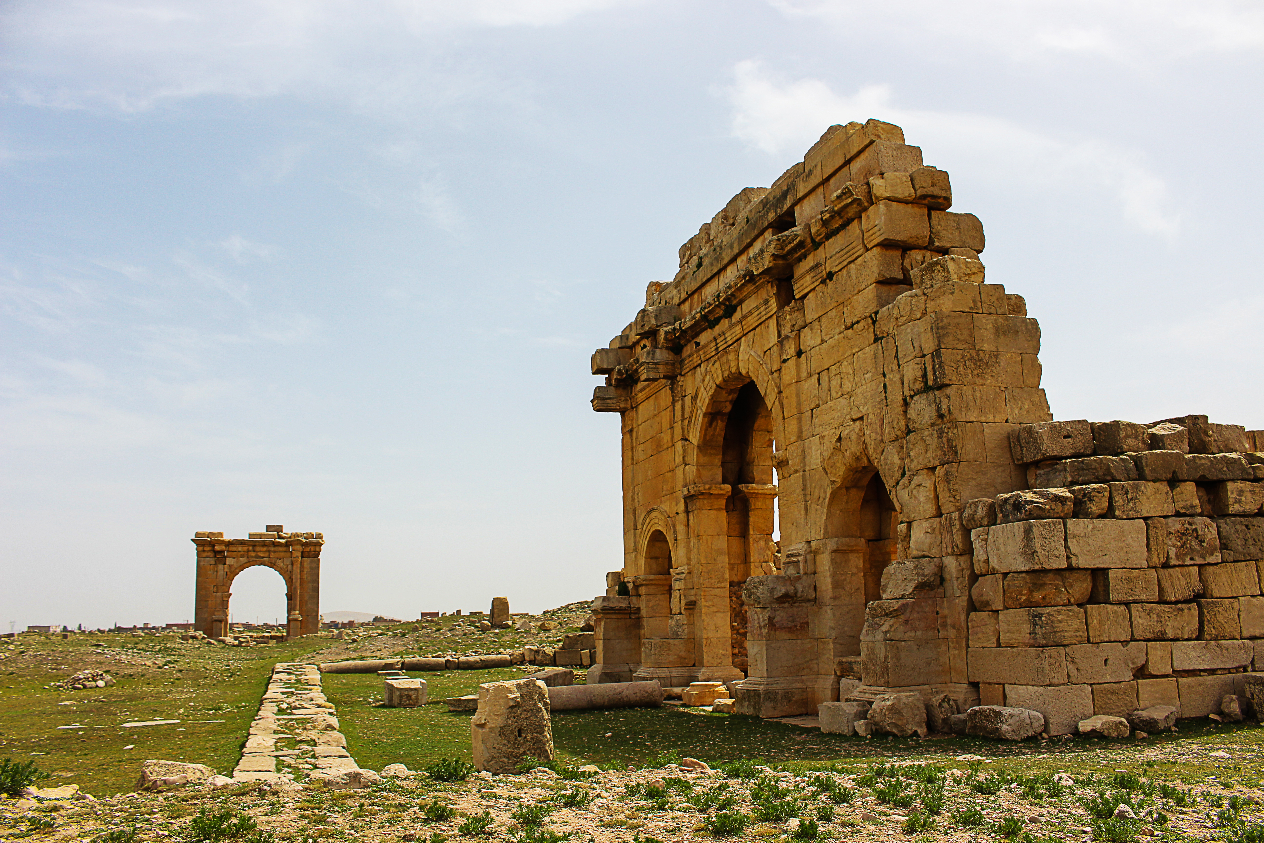 Les deux arcs de triomphe - Diana Vateranorum Batna